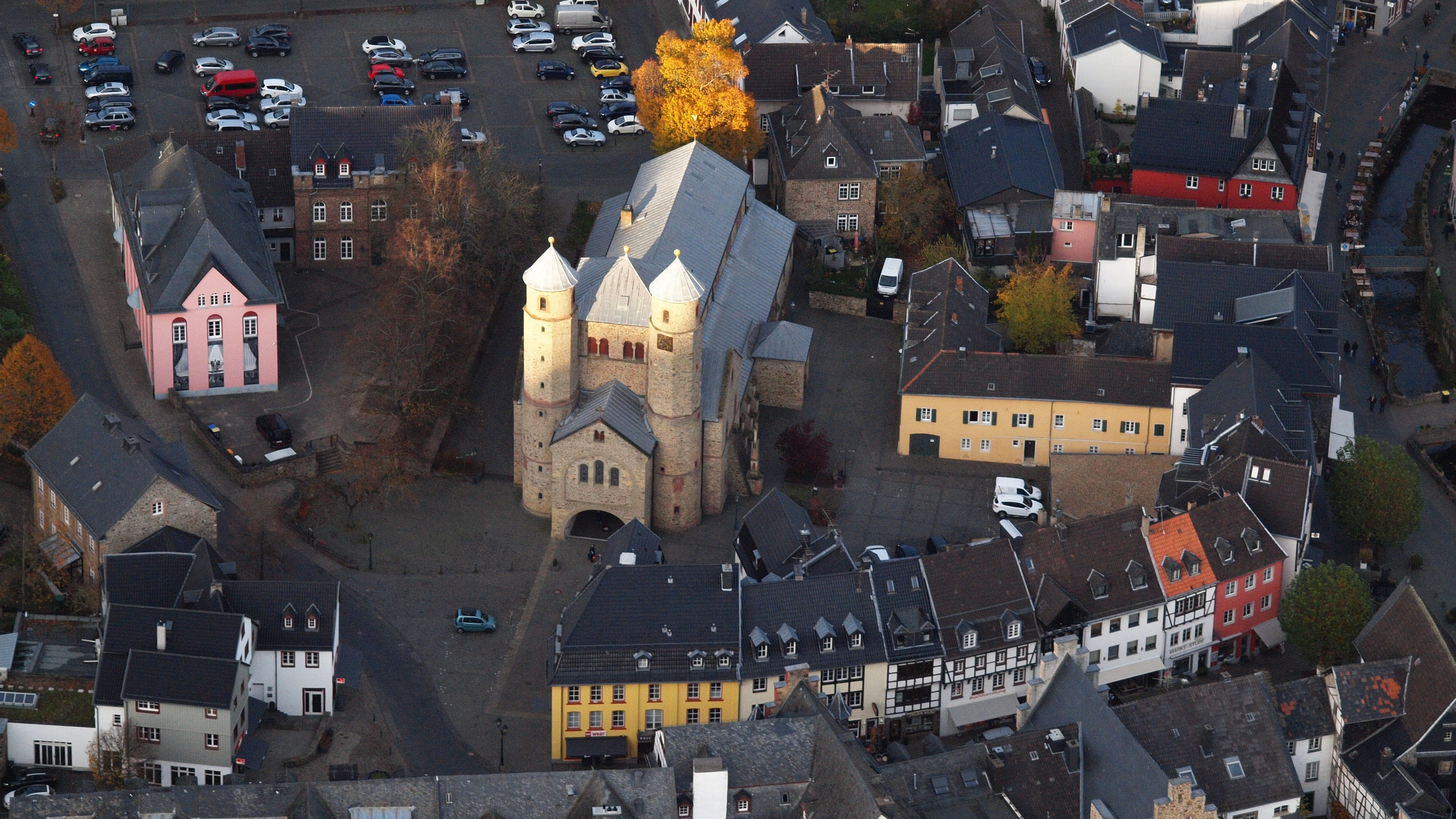 Katholische Pfarrkirche (Stiftskirche) St. Chrysanthus und Daria, Bad Münstereifel: Luftaufnahme (2015)